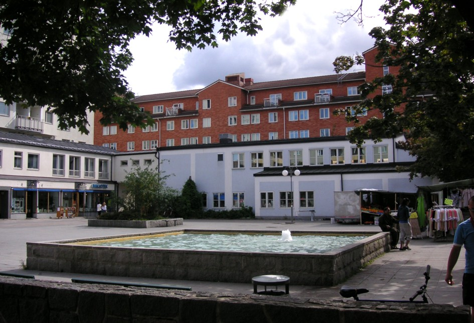 Bagarmossens gamla centrum